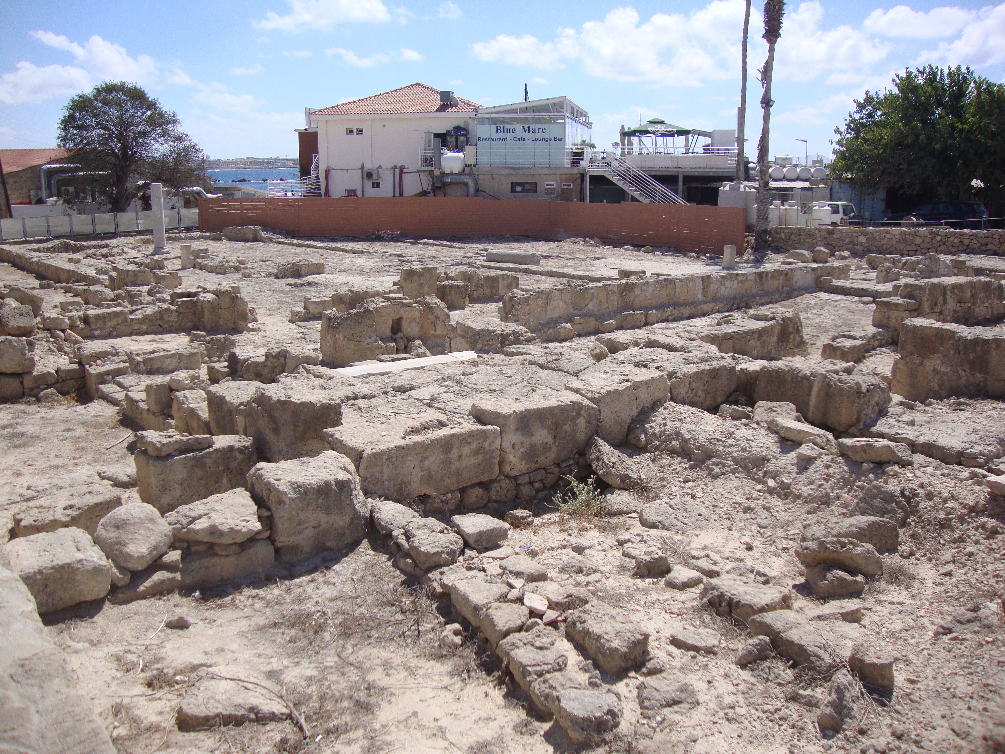 Руины базилики Панагия Лимениотисса. Пафос. 09.2013